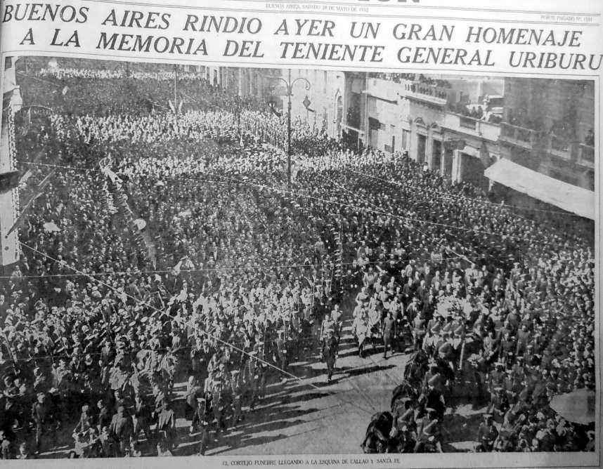 La Nación - Argentina - Primera plana. Buenos Aires rindió ayer un gran homenaje a la memoria del teniente general Uriburu. Entierro de José Félix Uriburu. - 28MAY1932